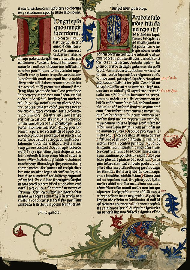 Српски (ћирилица): Стари рукопис